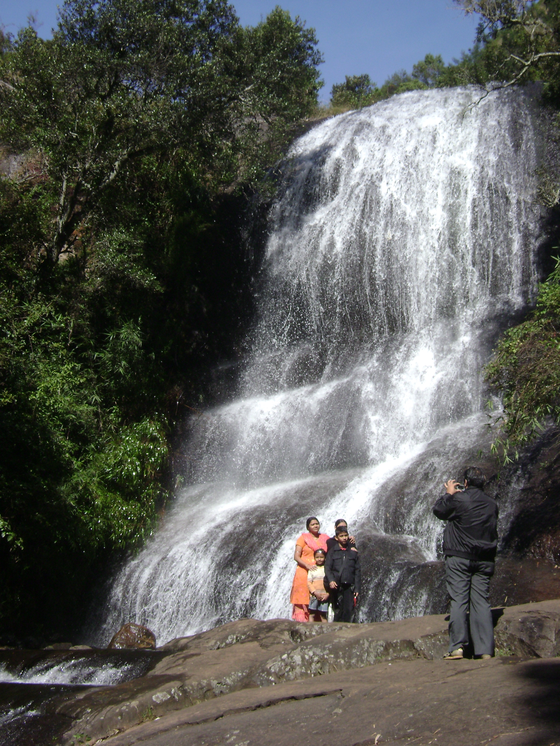 Bear Shola Falls at Kodaikanal